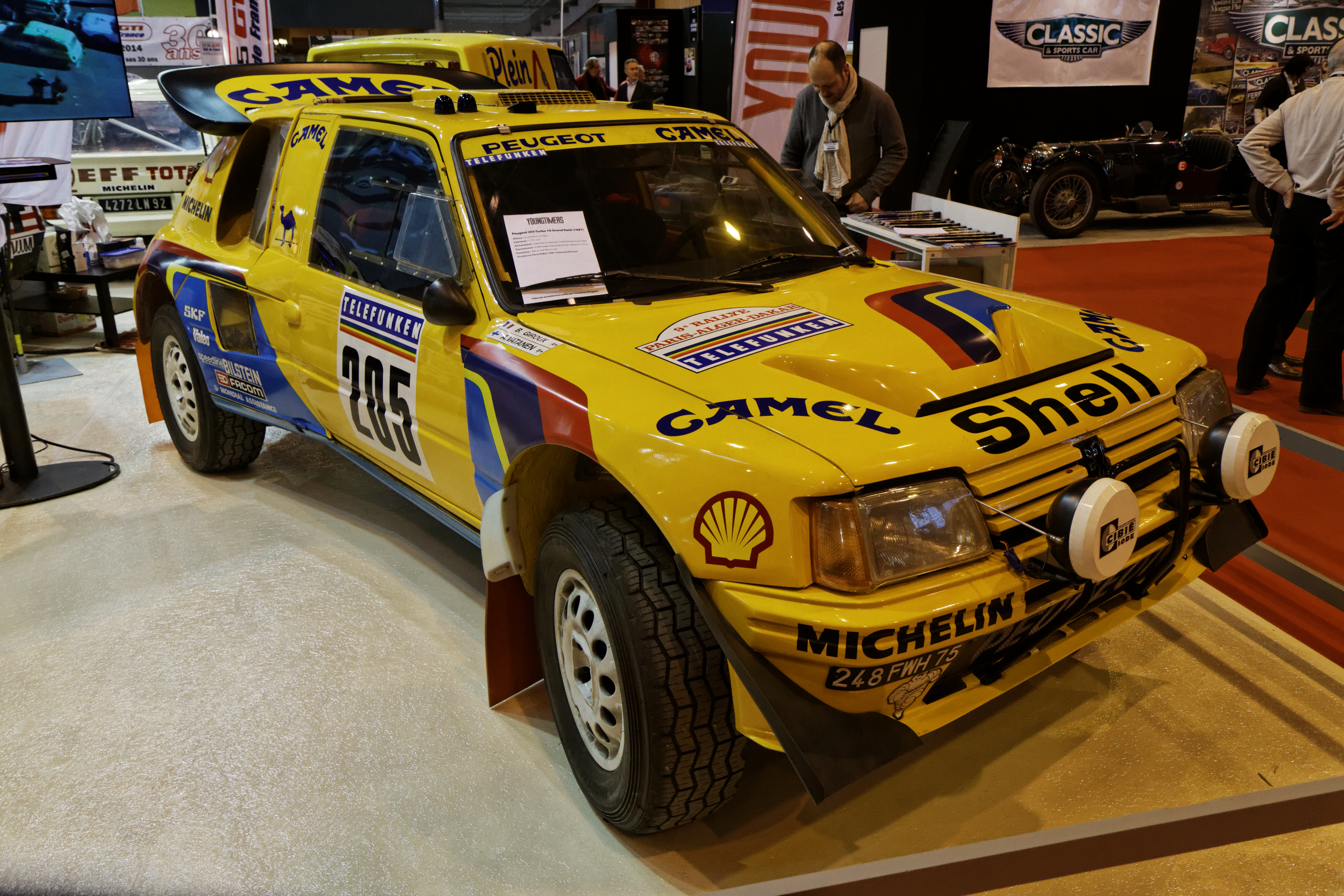 Une Peugeot 205 turbo 16 grand raid présentée lors du salon Retromobile 2014.